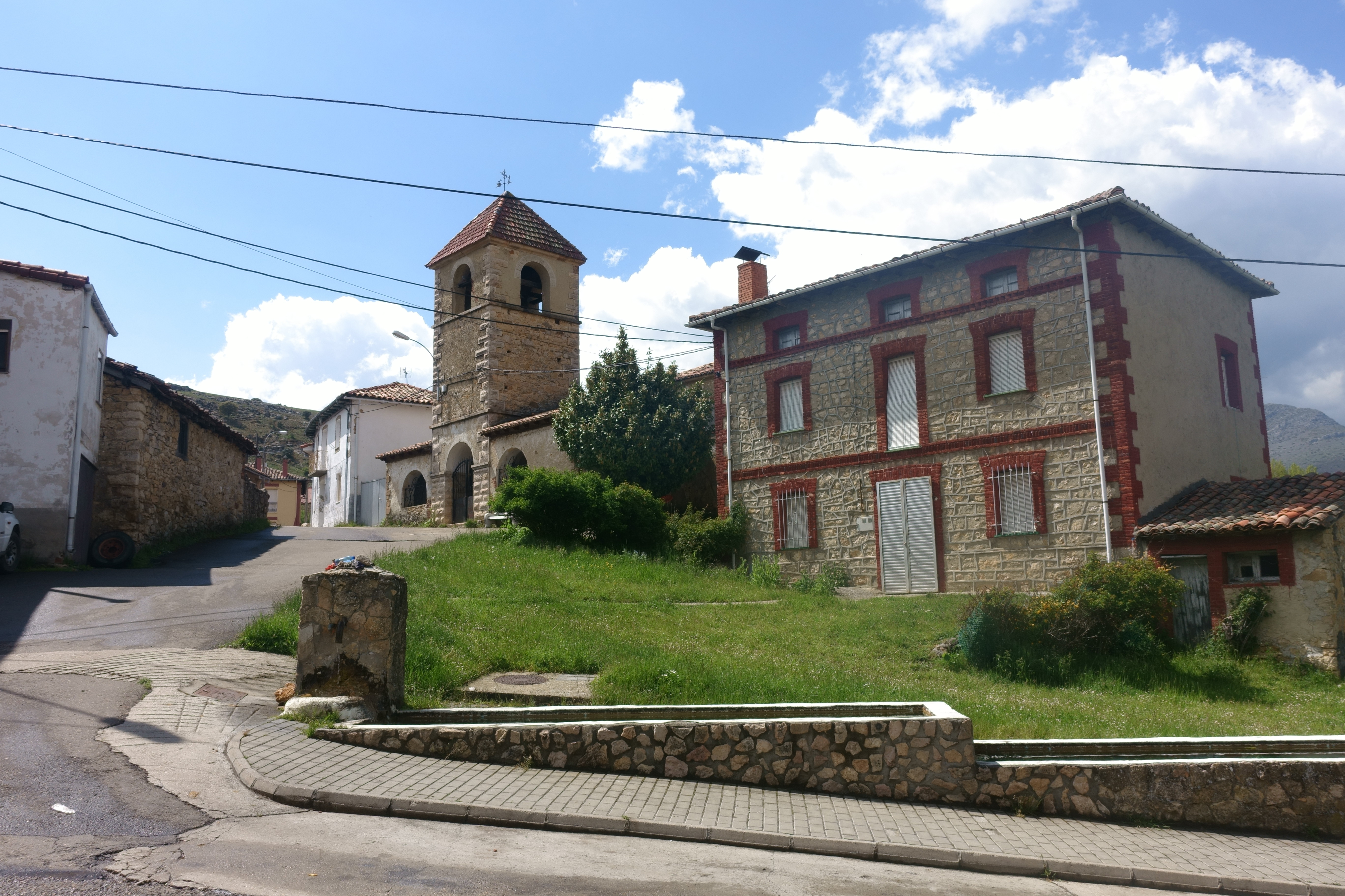 Vista de Prado de la Guzpeña (León, España).